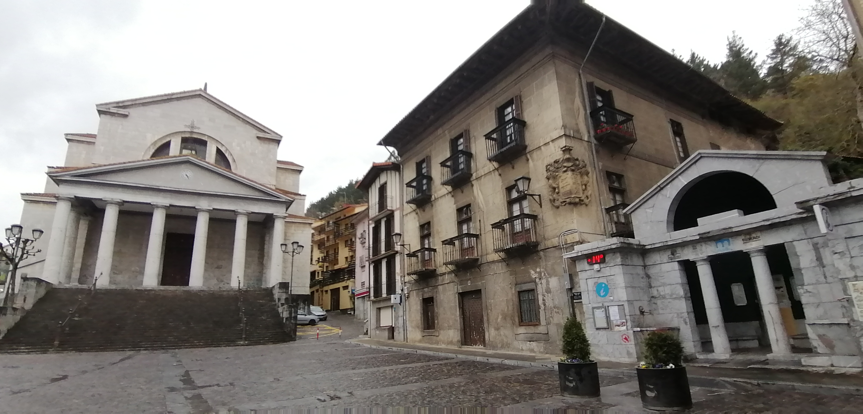 Mutrikuko Txurruka plaza 2020ko otsailean